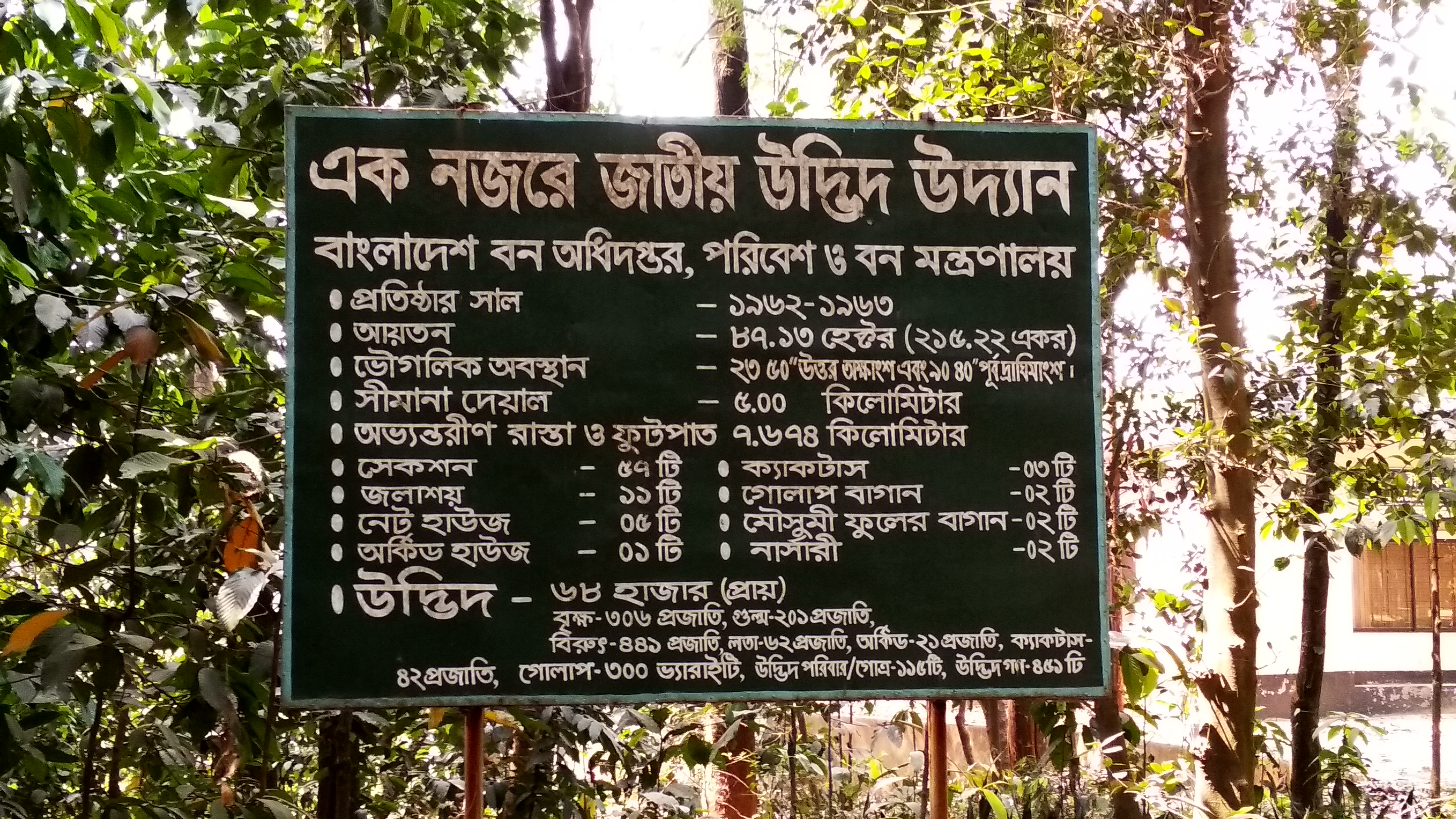 এক নজরে জাতীয় উদ্ভিদ উদ্যান বাংলাদেশ ২০১৮